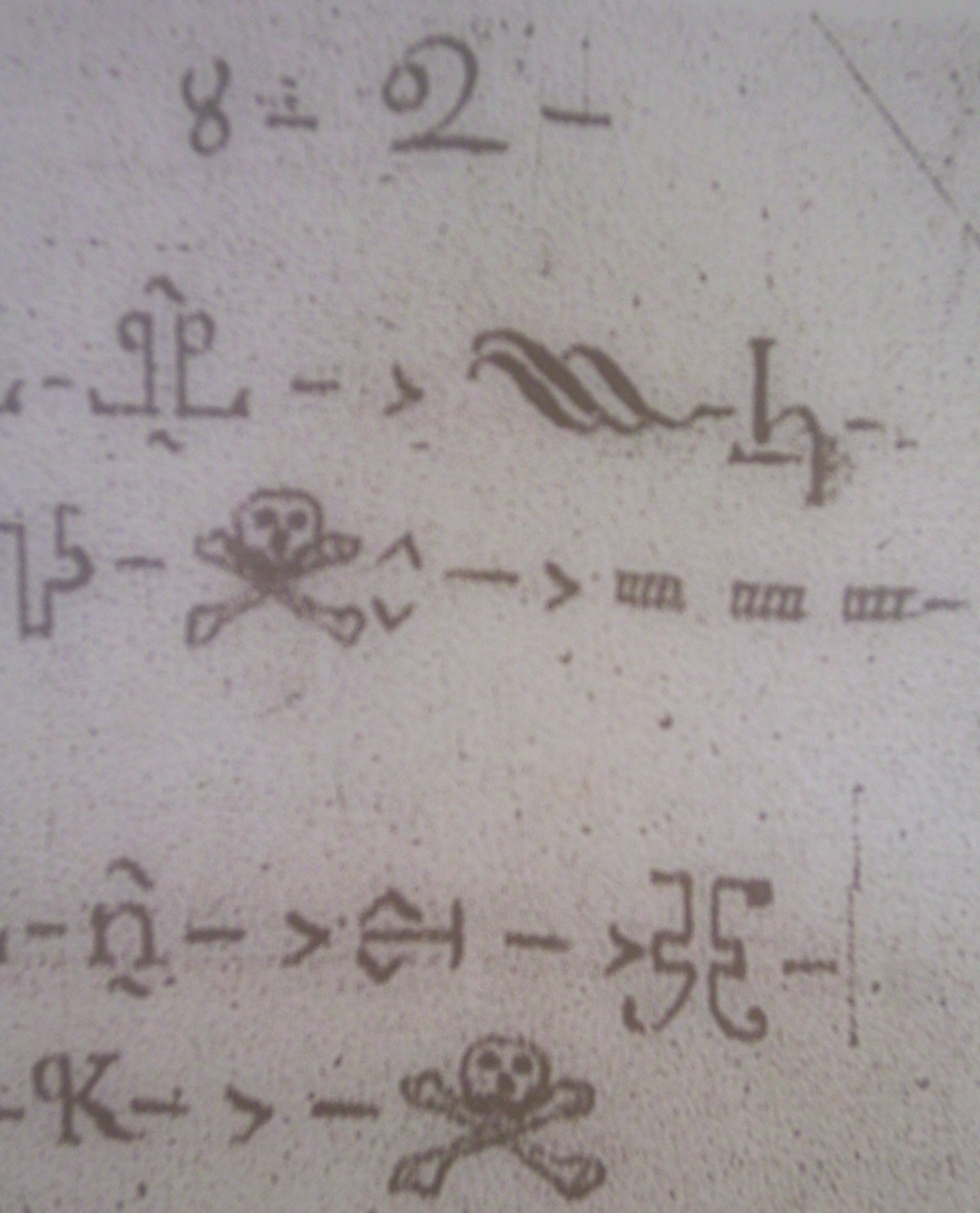 Photo d'une écriture hiéroglyphique des Micmacs à Louisbourg, Nouvelle-Écosse, Canada